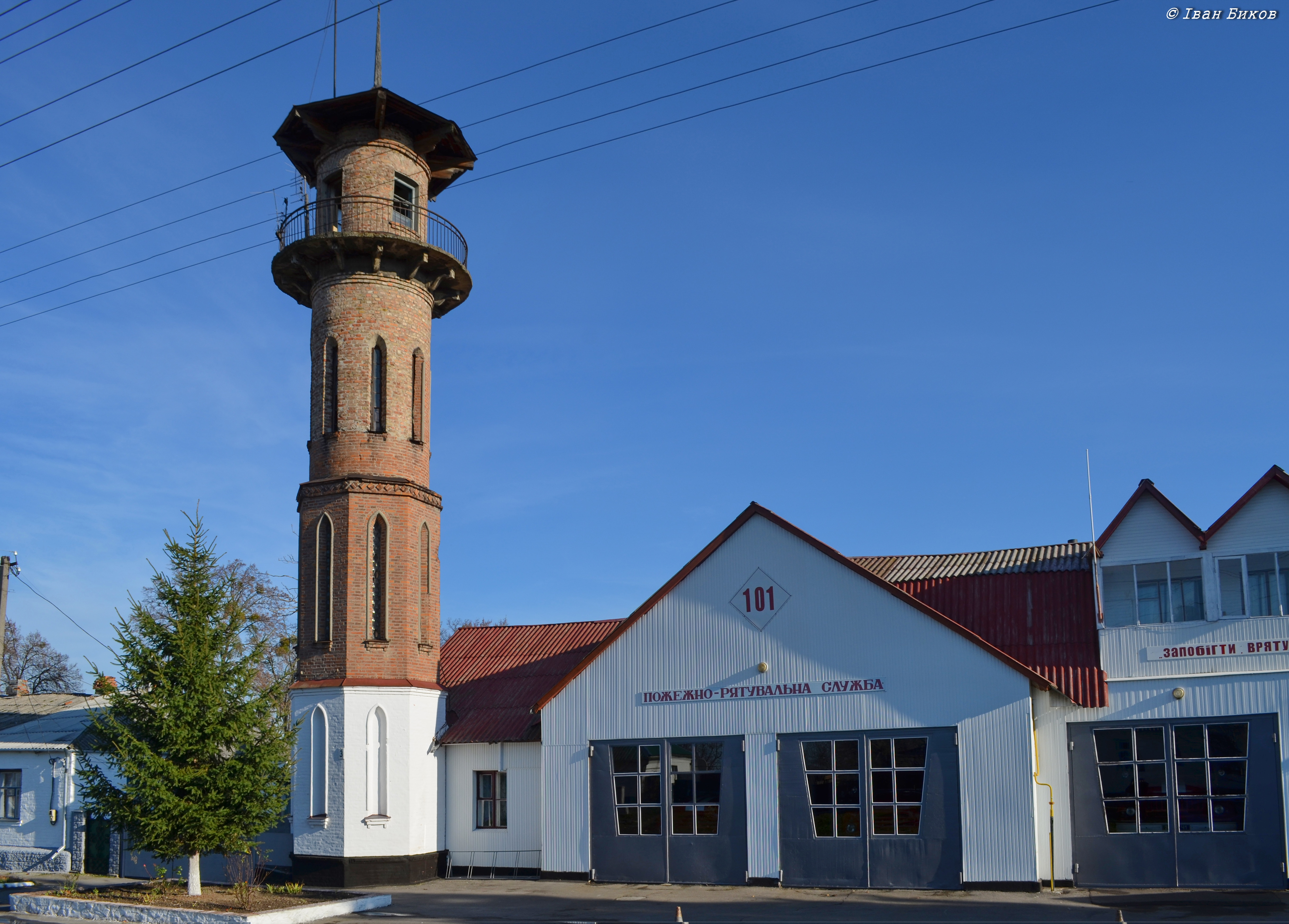 Пожежне депо з каланчею (мур.), Тараща